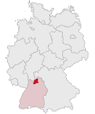 Neckar-Odenwald-Kreis, Baden-Württemberg, Germany